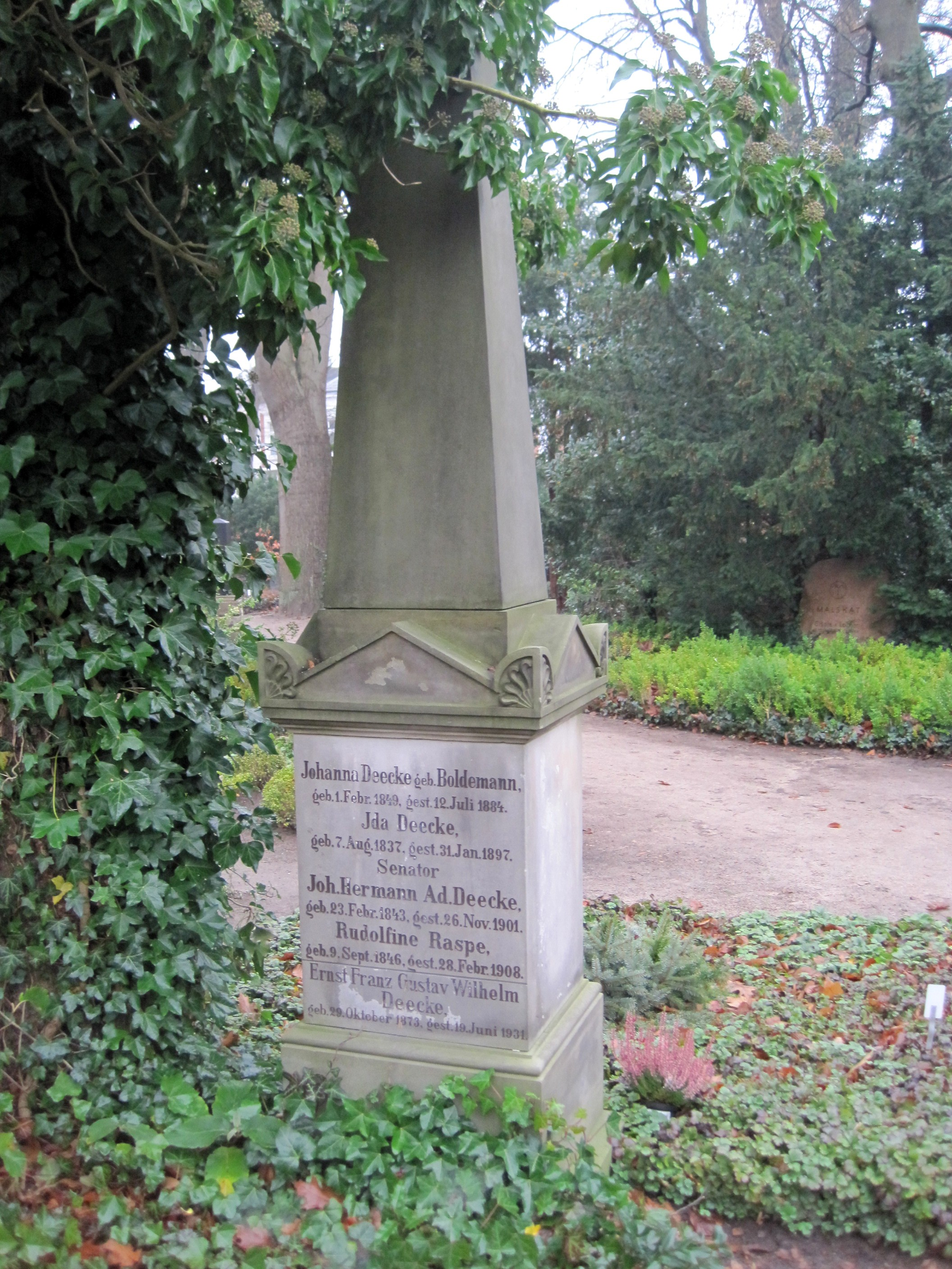 Erbbegräbnis der Familie des Lübecker Senators Hermann Deecke auf dem Burgtorfriedhof.